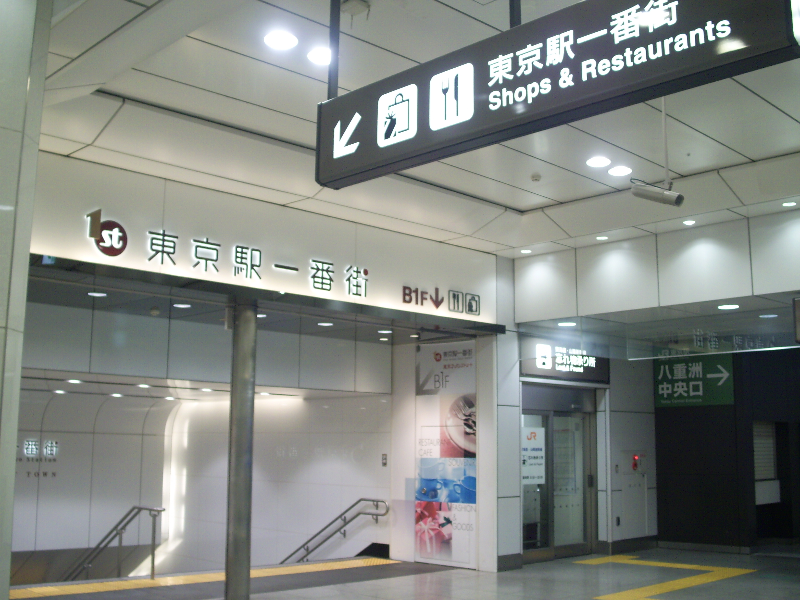 東京駅一番街、数分前に撮影した写真を一番街内の飲食店にてアップロード ㊟カメラを起動すると日付機能が出荷時のものに初期化されるため、ファイル履歴の撮影・投稿日時とメタデータの原画像データの生成日時が異なります